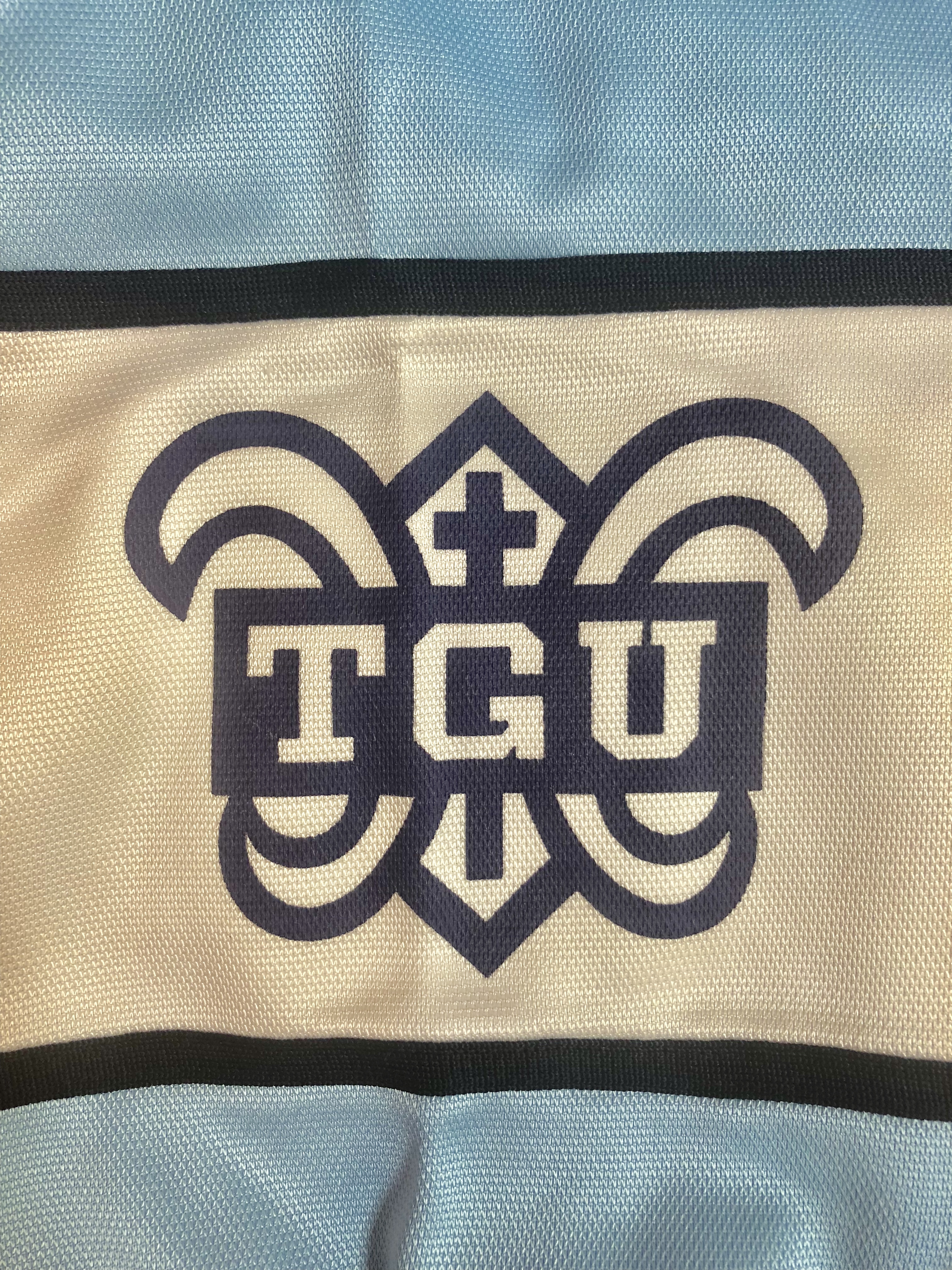 東北学院大学 ユリの紋章マーク 各部